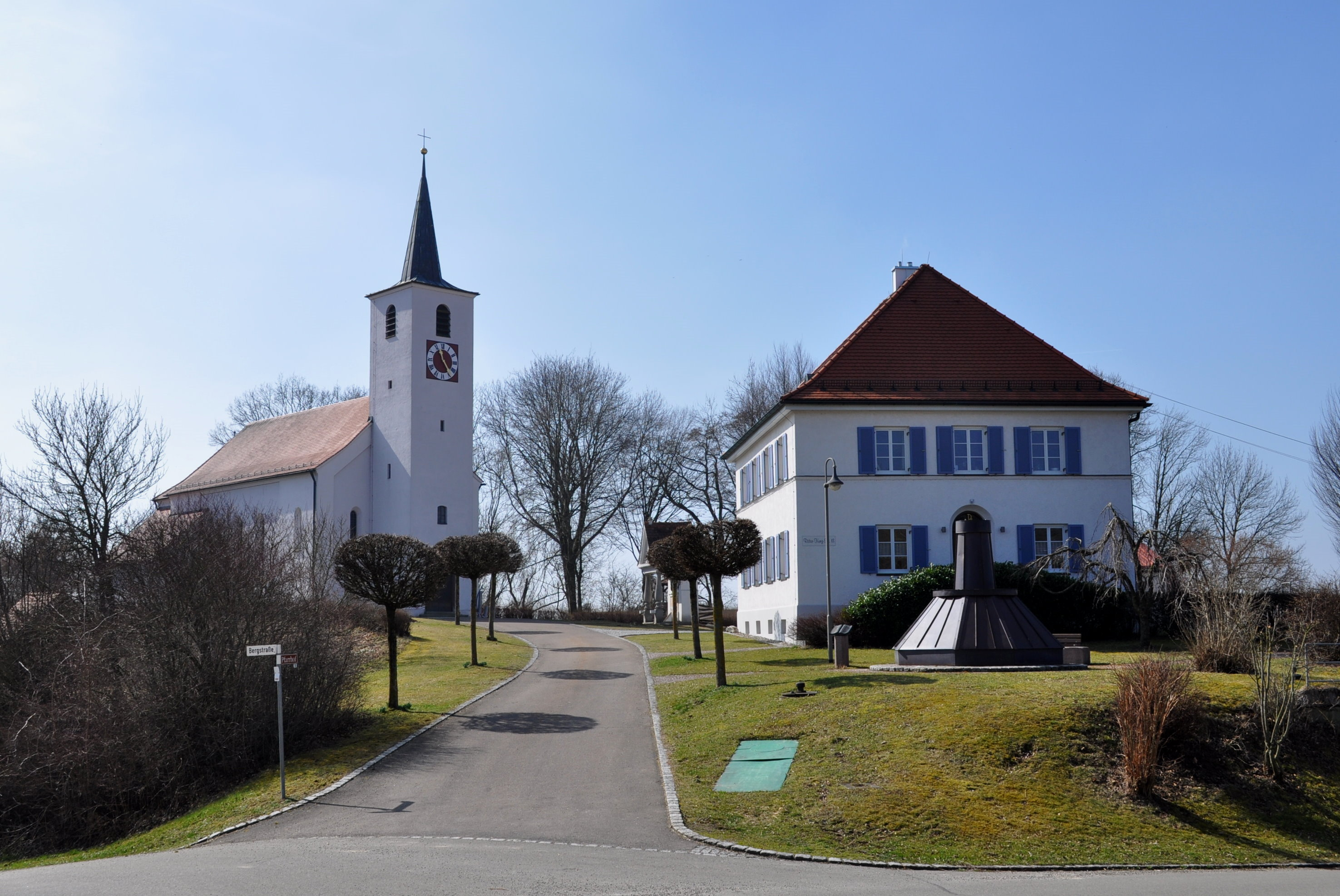 Kirche, Kriegerdenkmal und Pfarrhaus in Konzenberg